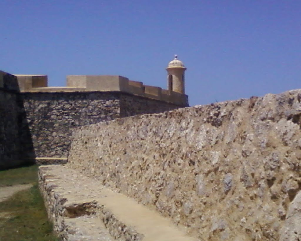 vista de una parte del castillo 2012.